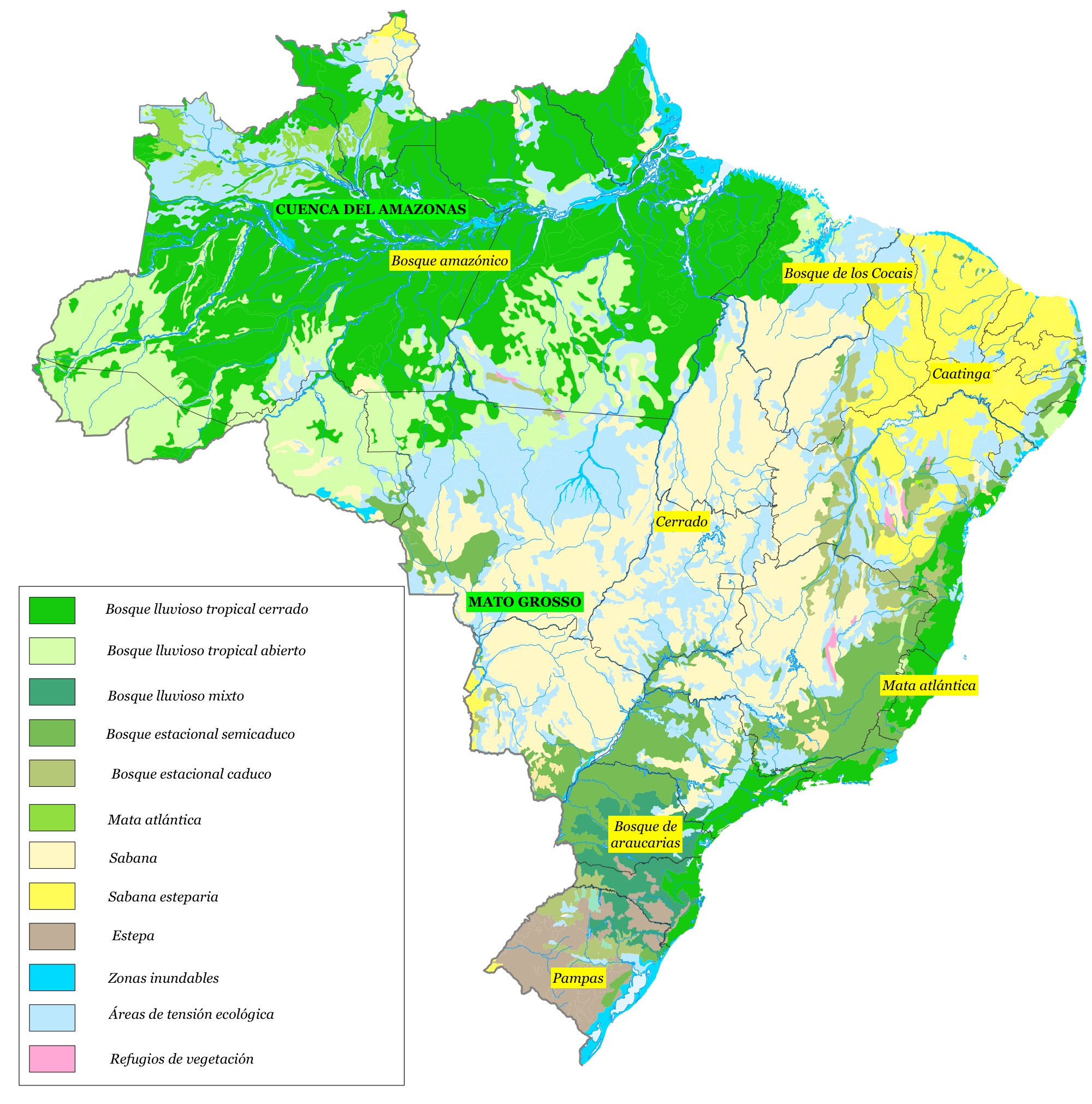 Flora de Brasil